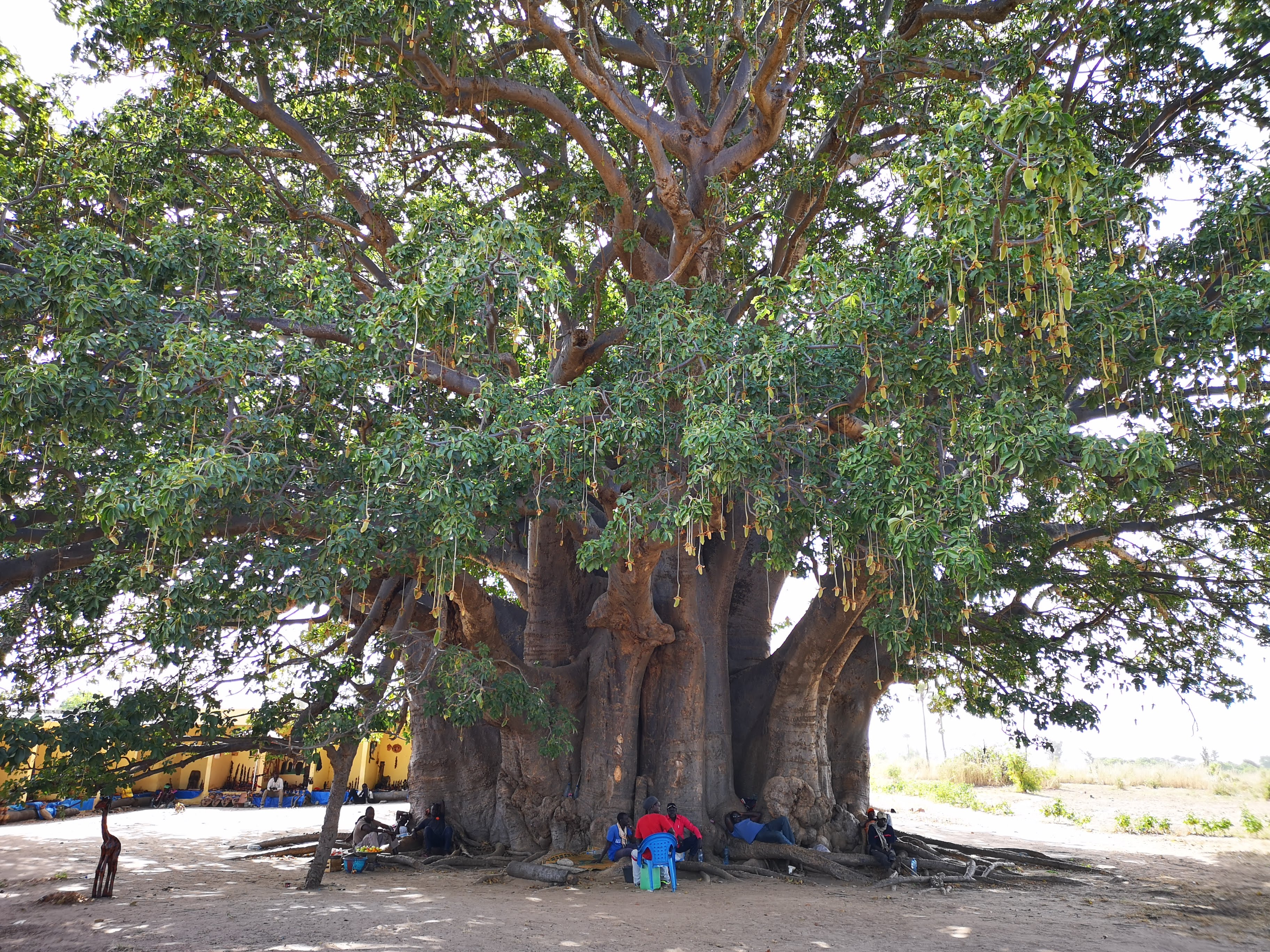 Le baobab sacré de Fadial au Sénégal aurait environ 950 ans en 2018.